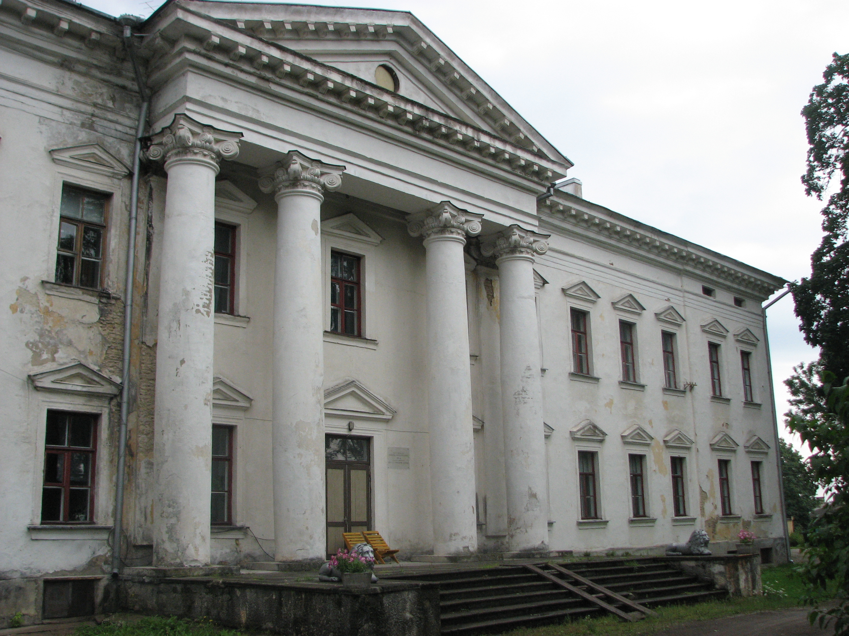 Udriku manor, Estonia